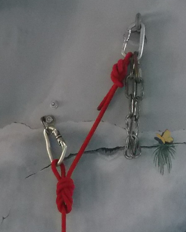 Etape de l'élaboration du n�œud de Romano